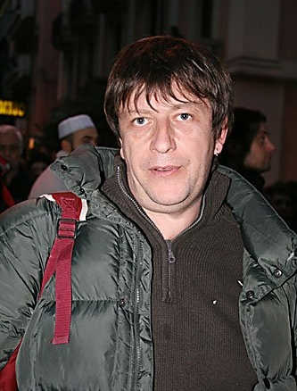 Luca Casarini